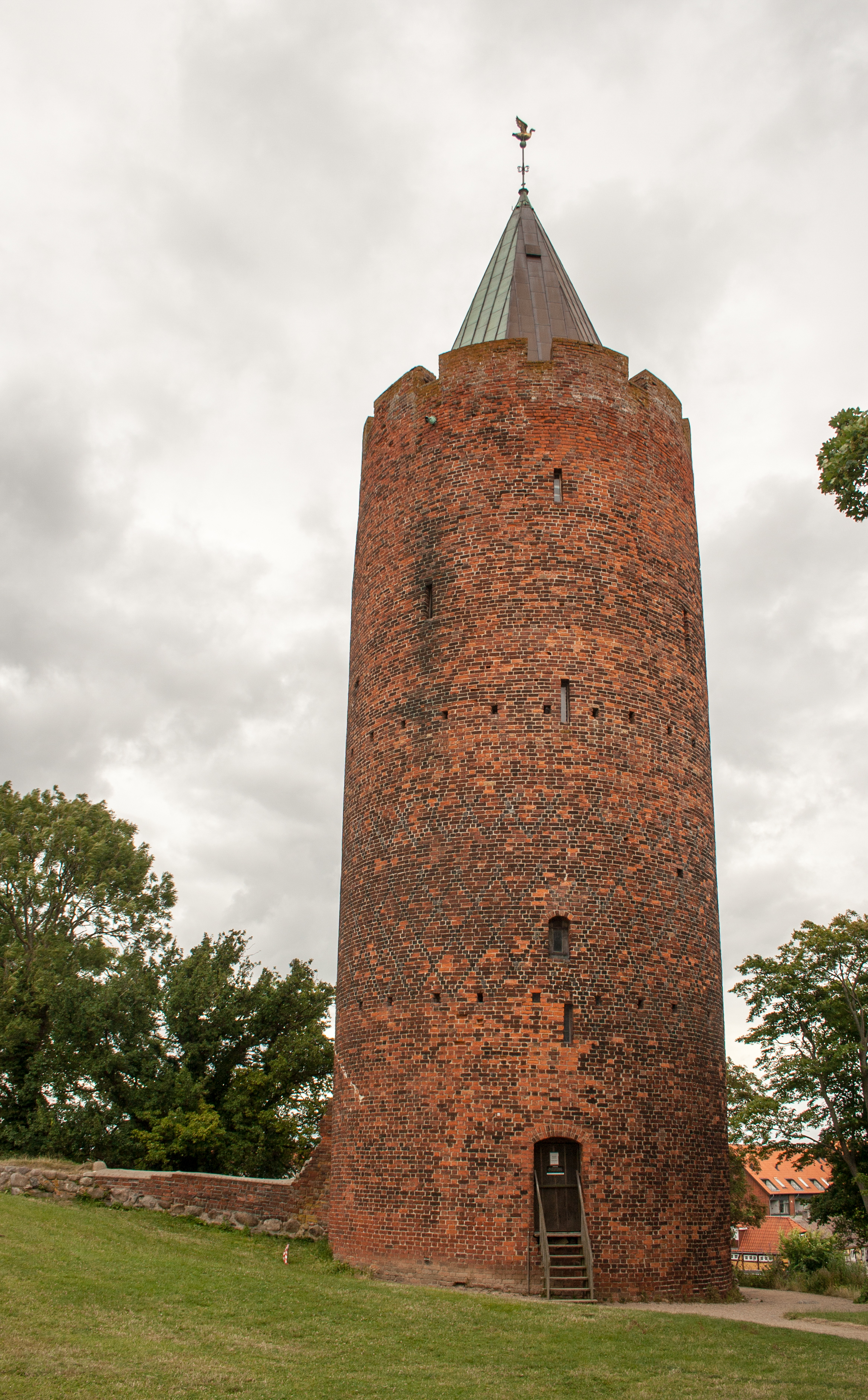 Vordingborg, Goose Towerlabel QS:Len,"Vordingborg, Goose Tower" label QS:Lhu,"Vordingborg, Lúdtorony"